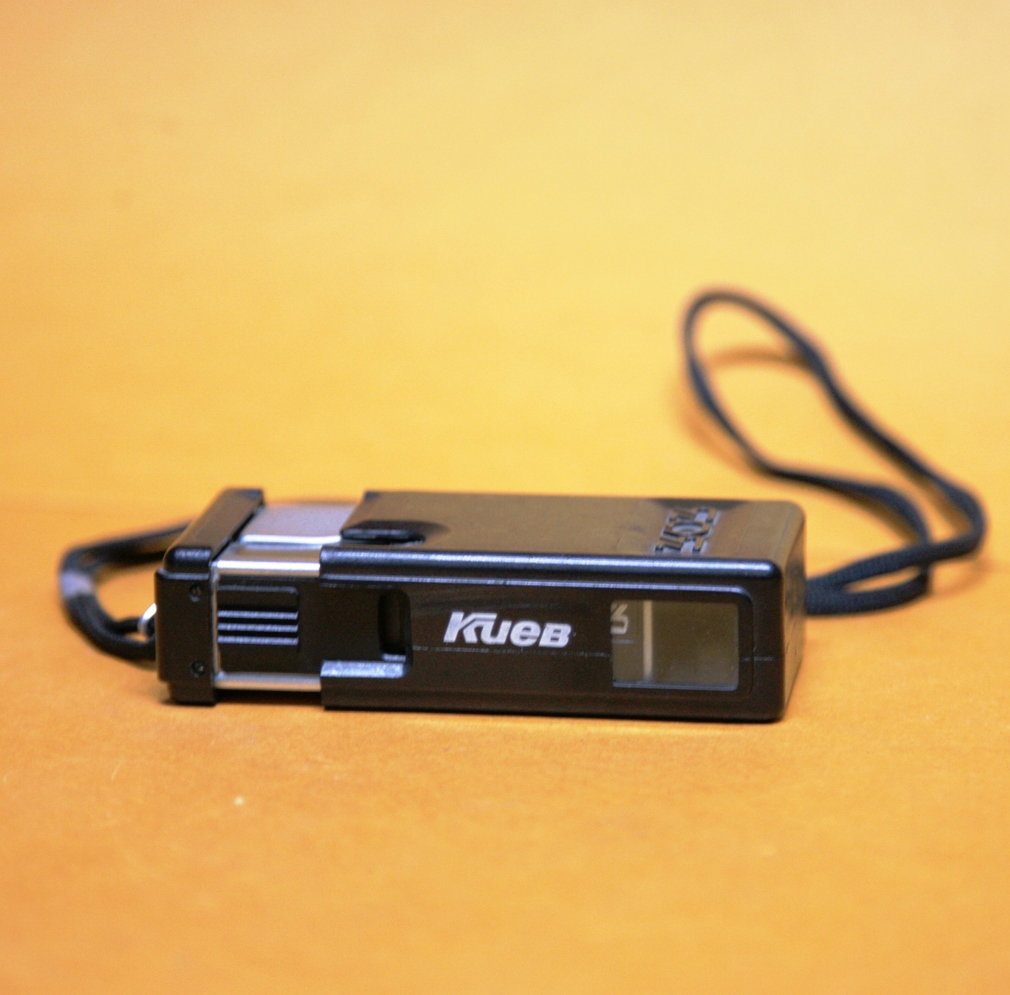 Coll. marcè CL - KIEV Kueb 303 13x17 mm obiettivo Industar-M 3.5/23; prodotta nel 1990[1]